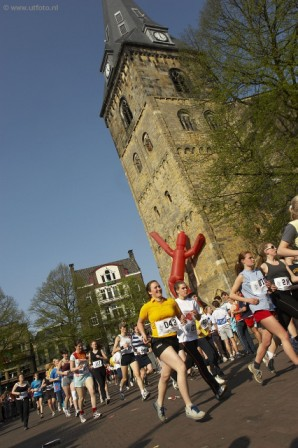 Deelnemers Batavierenrace 2005, 23 april 2005, eigen werk